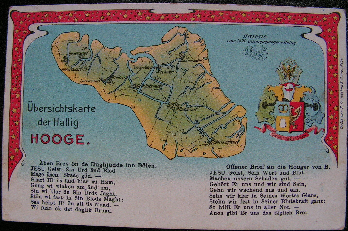 Alte Karte (auf Postkarte) der Hallig Hooge, Nordfriesische Inseln